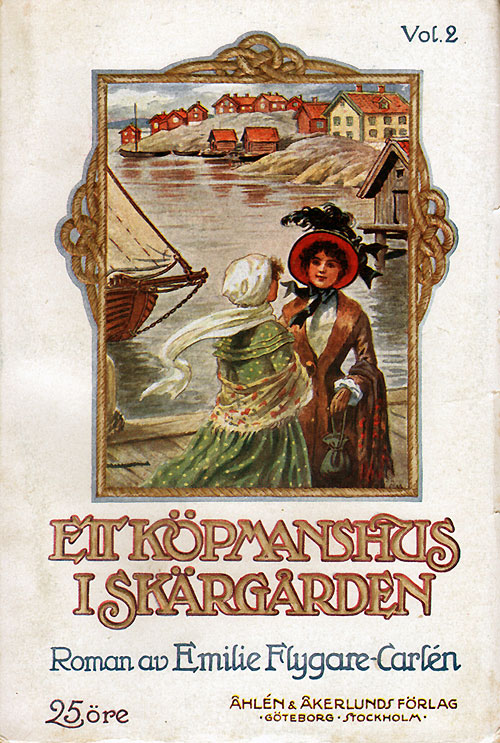 Flygare-Carlén: Ett köpmanshus i skärgården. Book cover